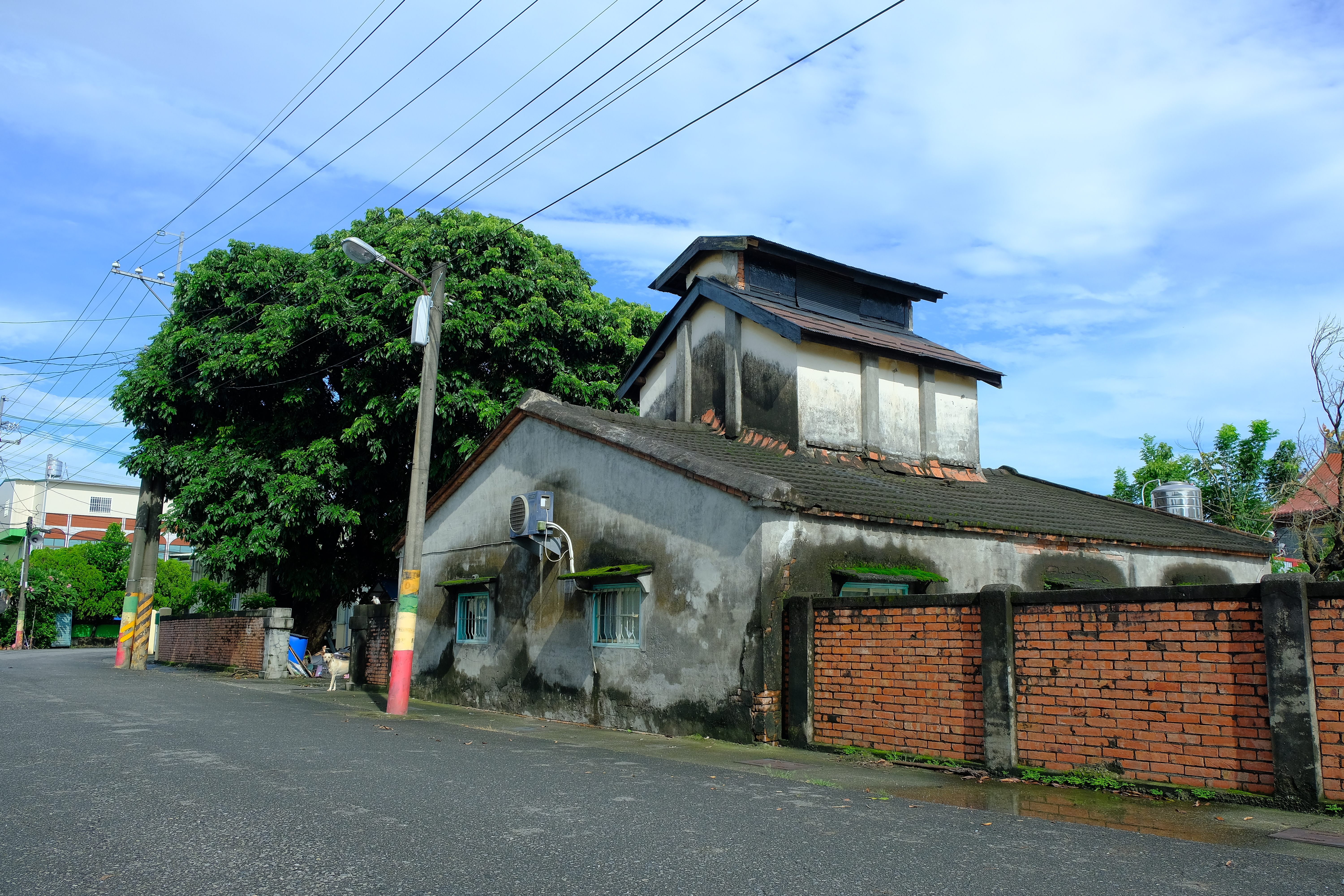 中文（台灣）: 戰後里港鄉菸樓